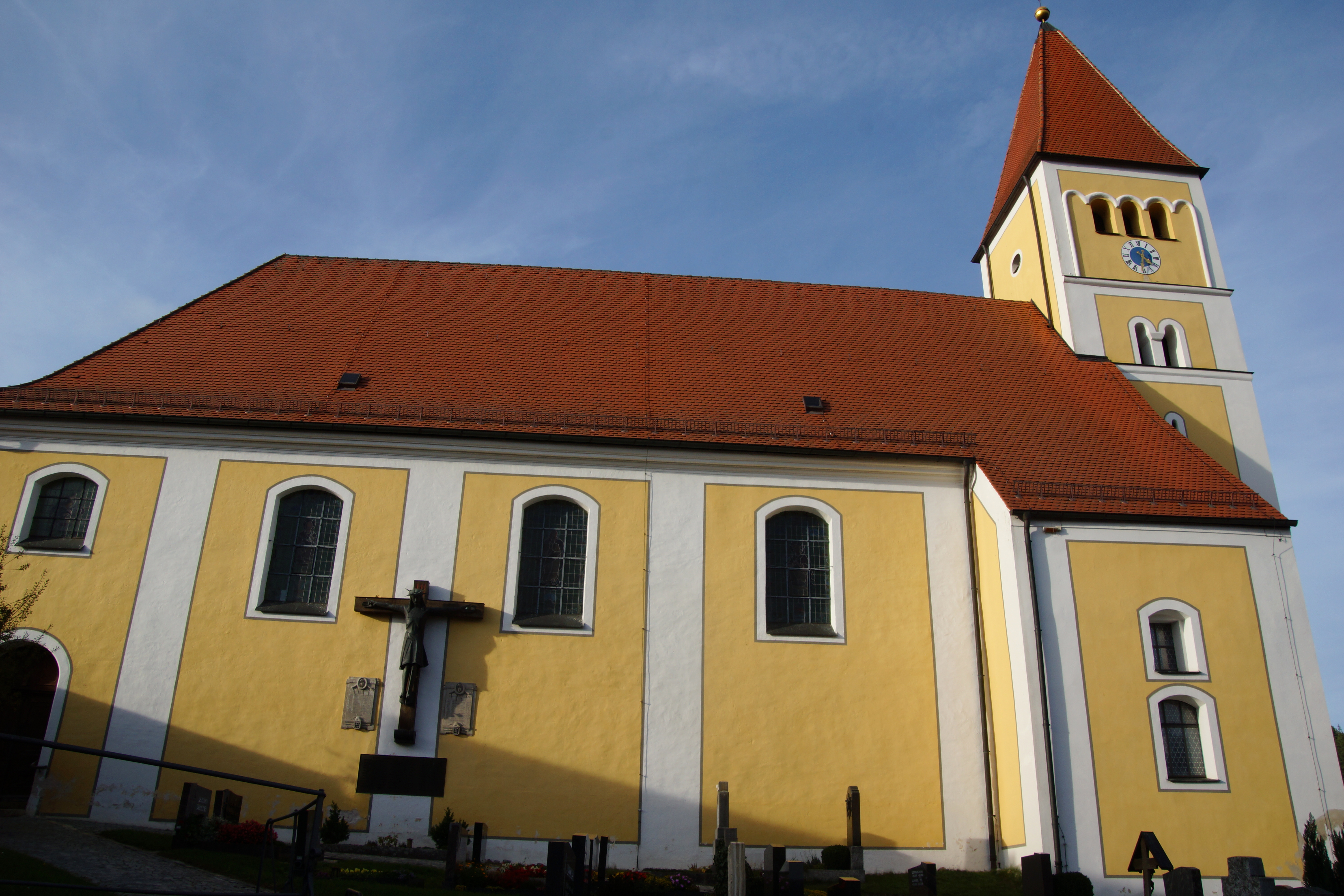 Die Simultan-Pfarrkirche St. Vitus in der Oberpfälzer Gemeinde Illschwang